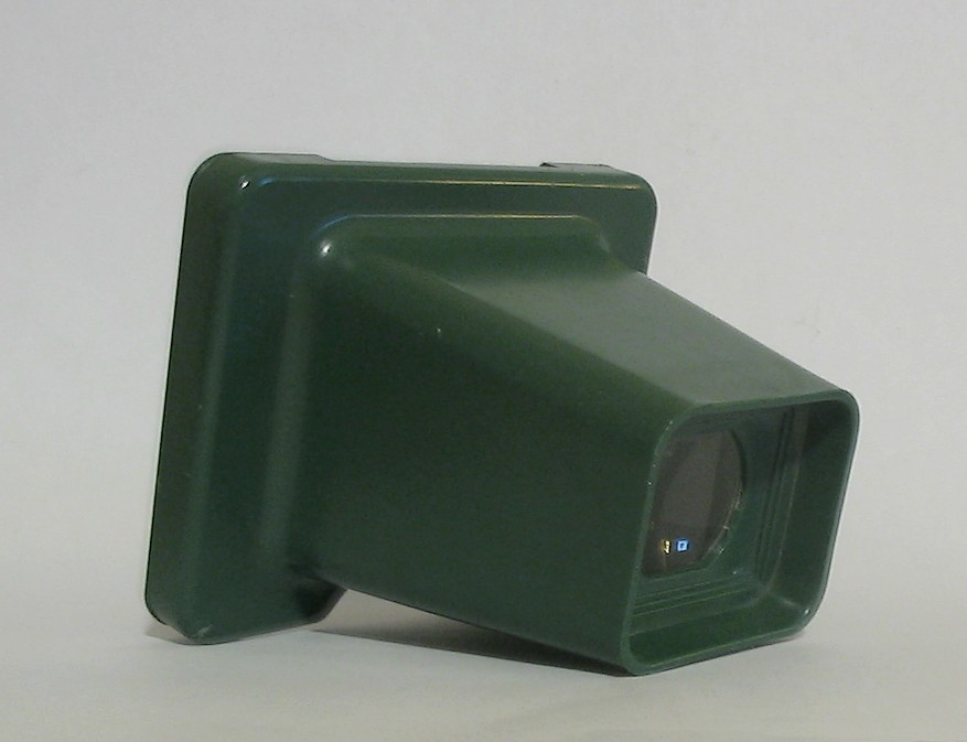 Przeglądarka diapozytywów